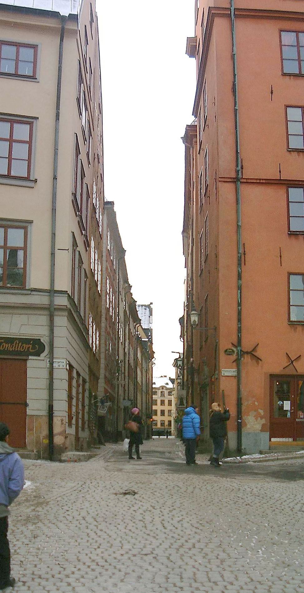 Köpmangatan, Stockholm, in February 2007.